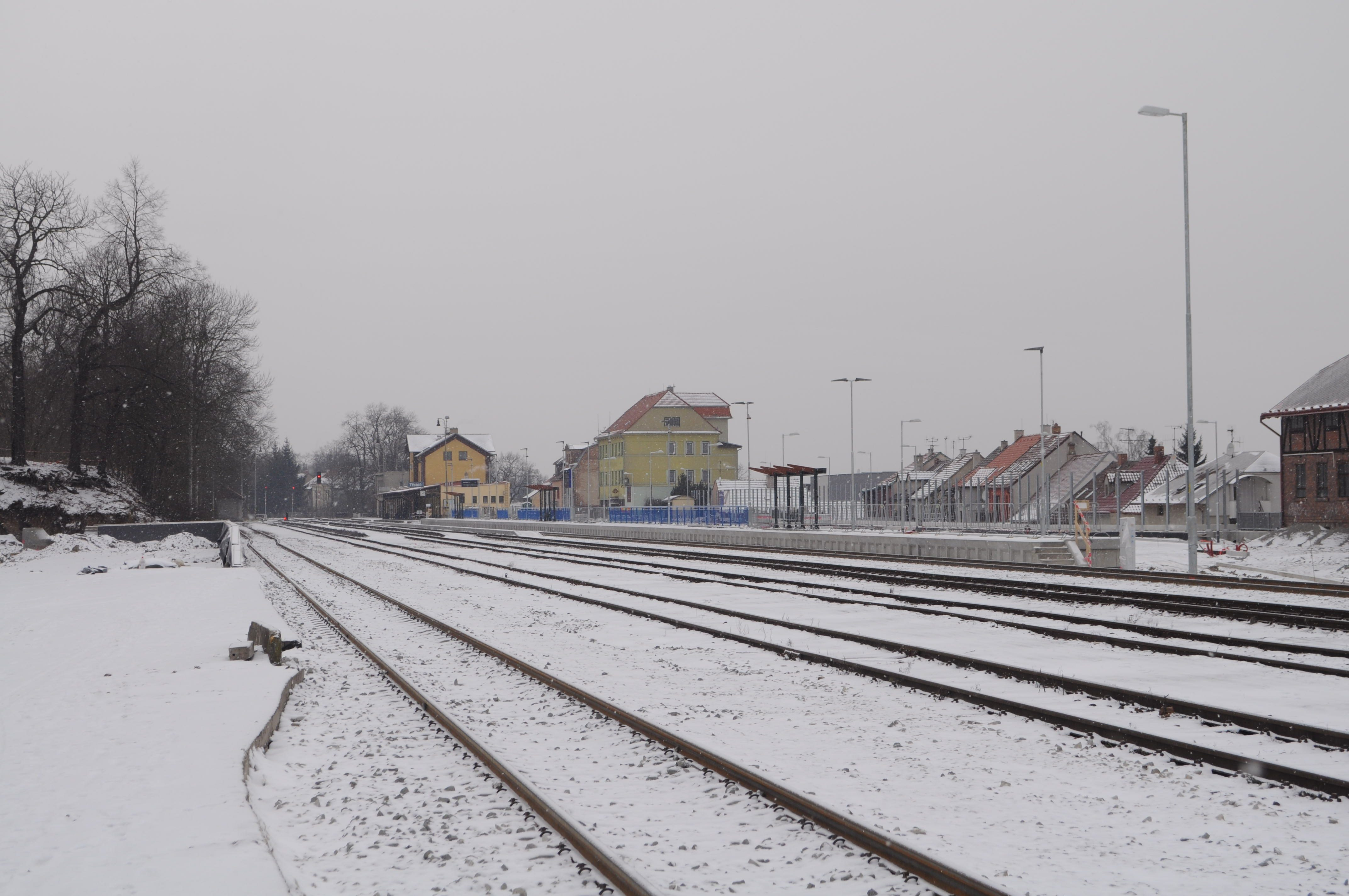 Vlakové nádraží v Třebíči a průběh rekonstrukcí ke dni 31. 12. 2014